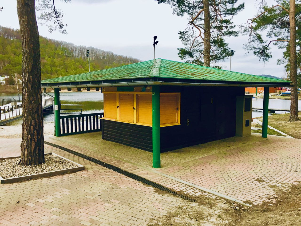 Plážový novinový kiosek je jedním z příkladů hodnotné a kompaktní účelové zástavby kolem Máchova jezera. Postaven ve 20. letech 20. stol., svému účelu slouží dodnes.